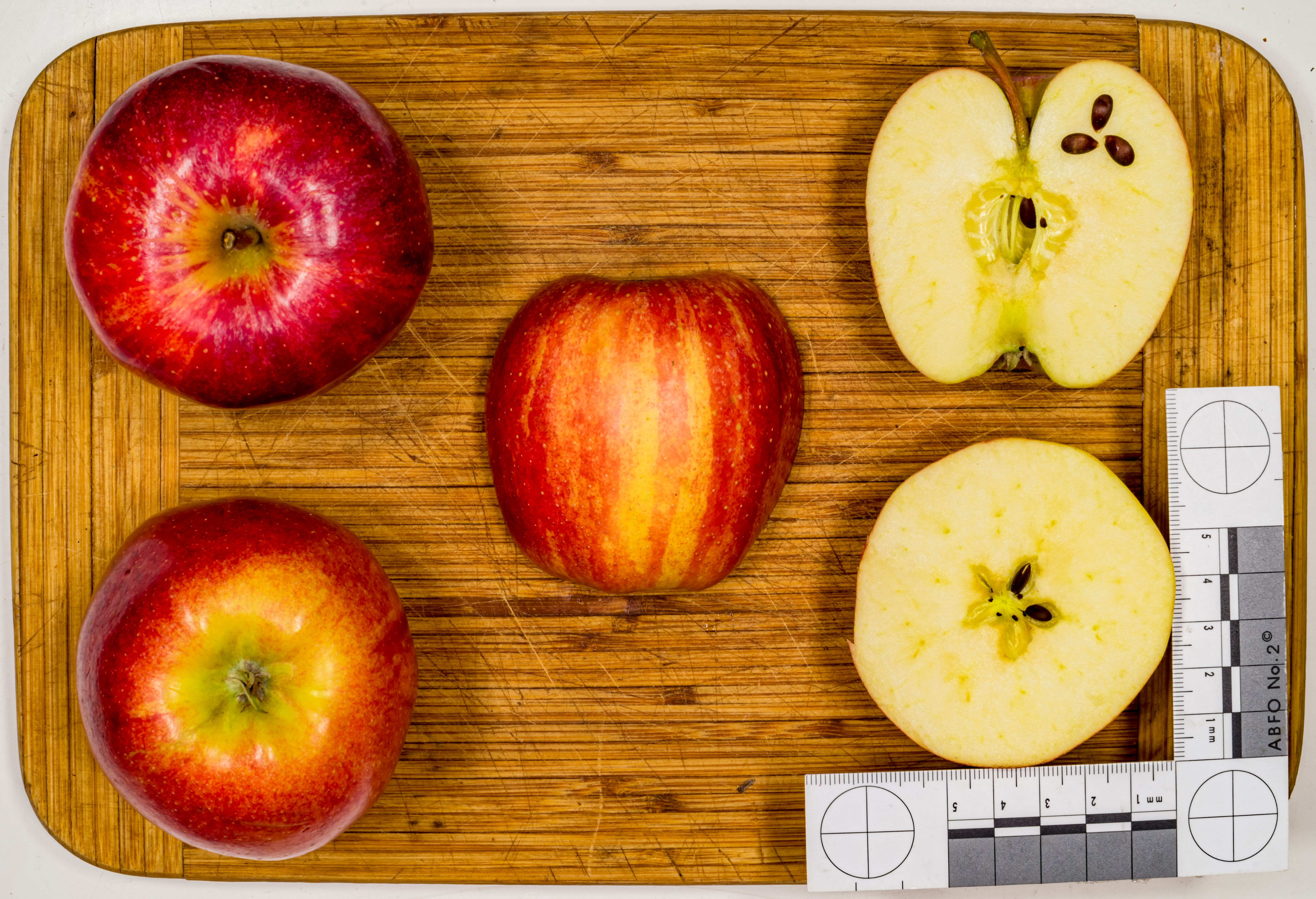 Apfelsorte: Royal Gala